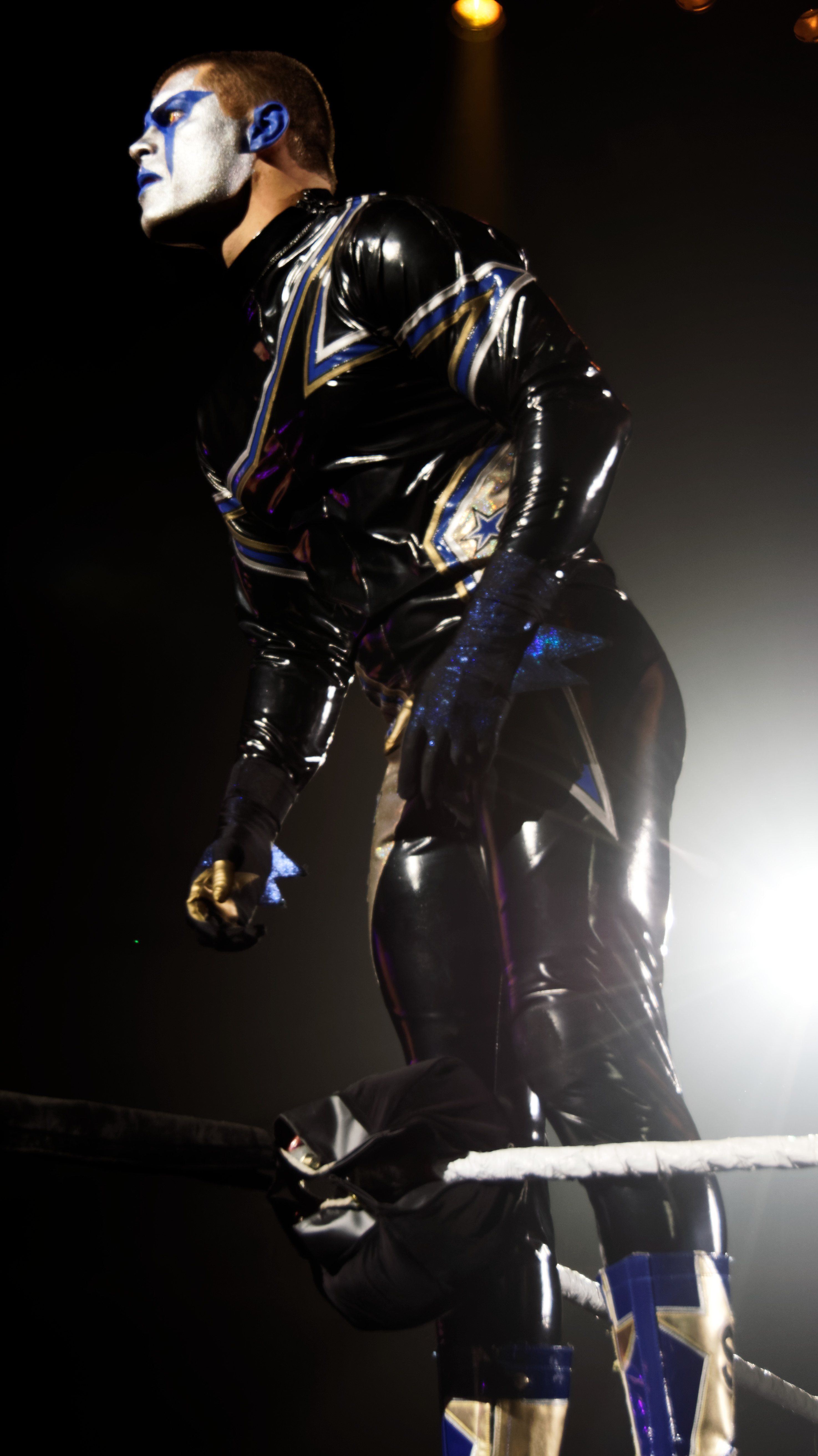 WWE Live@Lotto Arena - Antwerpen